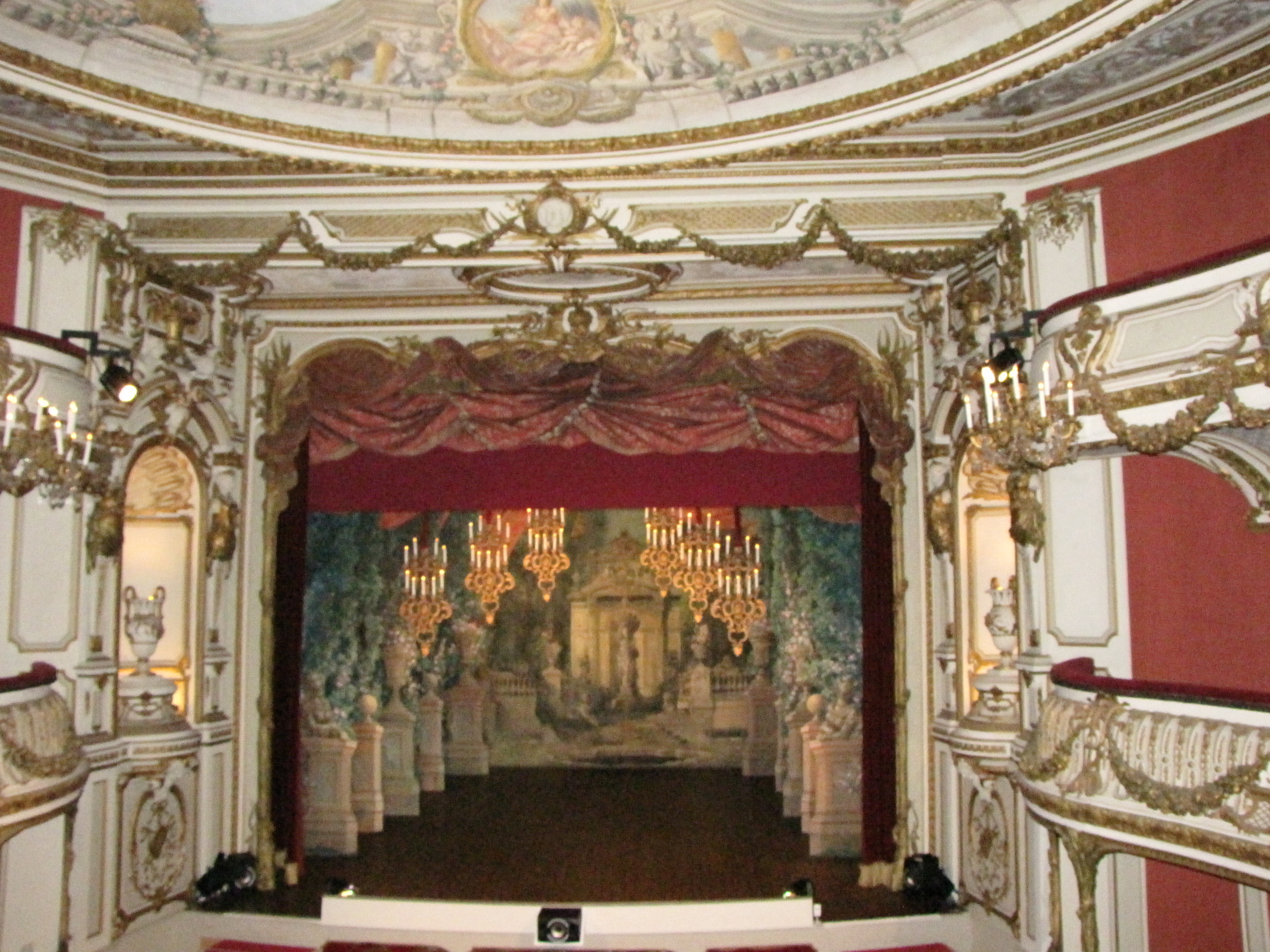 Maison